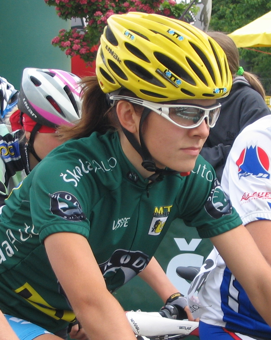 Maja Włoszczowska na starcie gdyńskiej edycji Skoda Auto GP 2005, w koszulce liderki klasyfikacji łącznej. Autorem zdjęcia jest Pitert Author: Piter T.